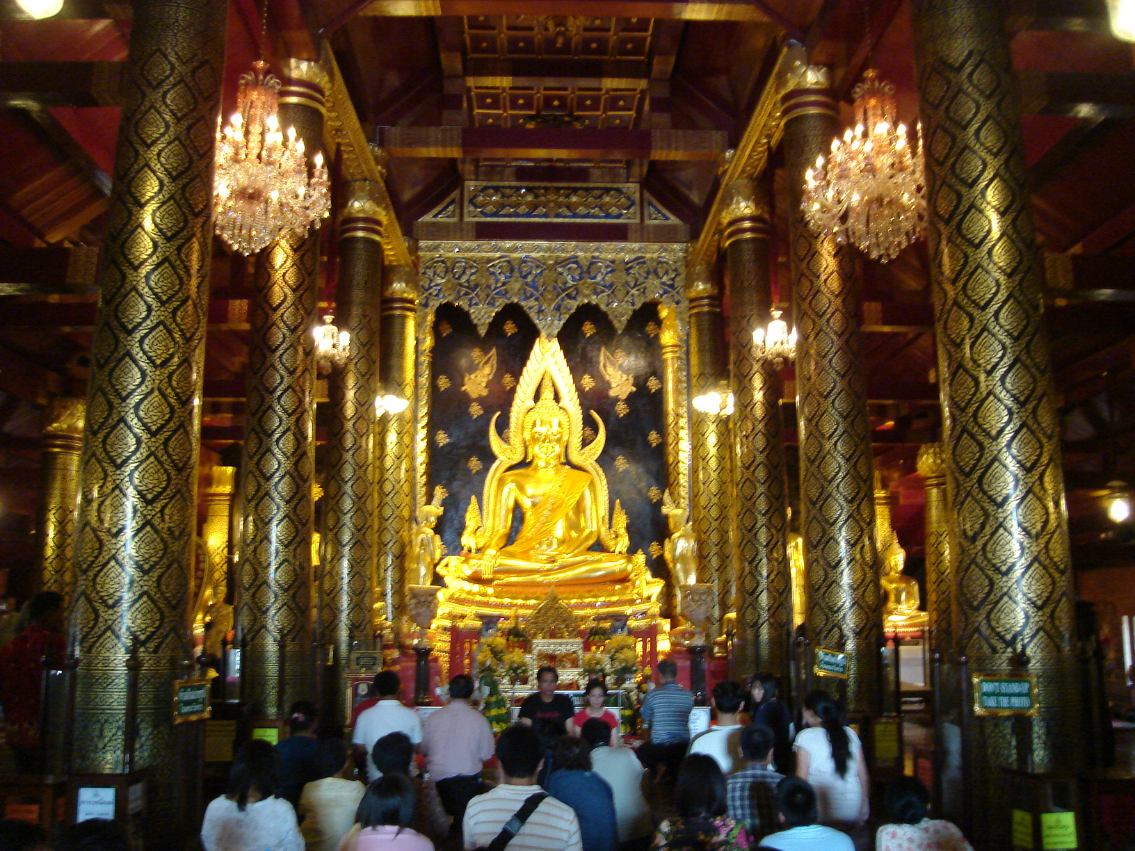 ภายในพระวิหารพระพุทธชินราช วัดพระศรีรัตนมหาธาตุวรมหาวิหาร Wat Phra Sri Ratanamahatat.Phitsanulok,Thailand.2006